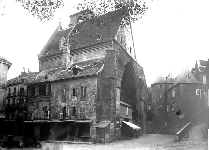 Vue d'ensemble.